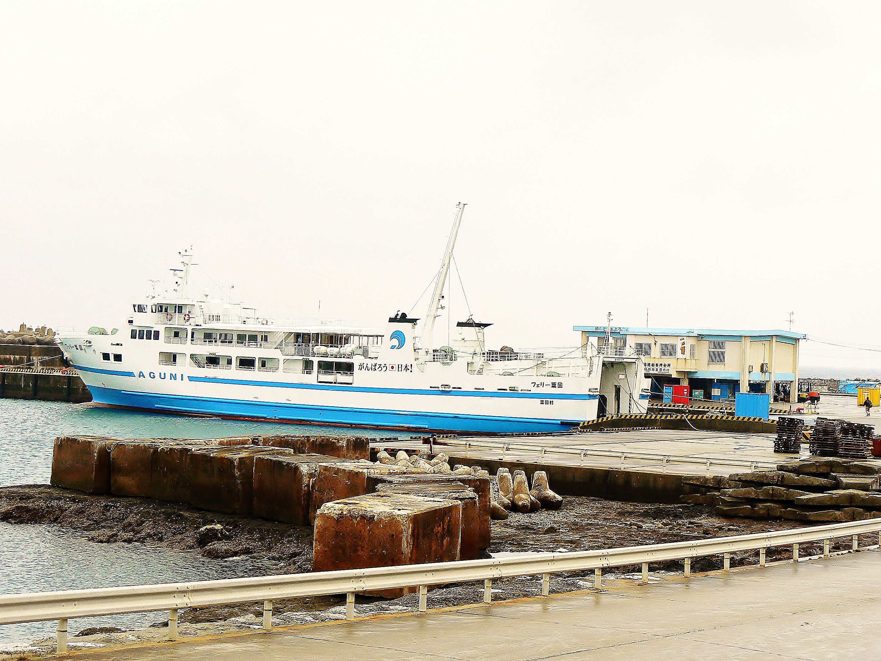 粟国港に停泊中の「フェリー粟国」